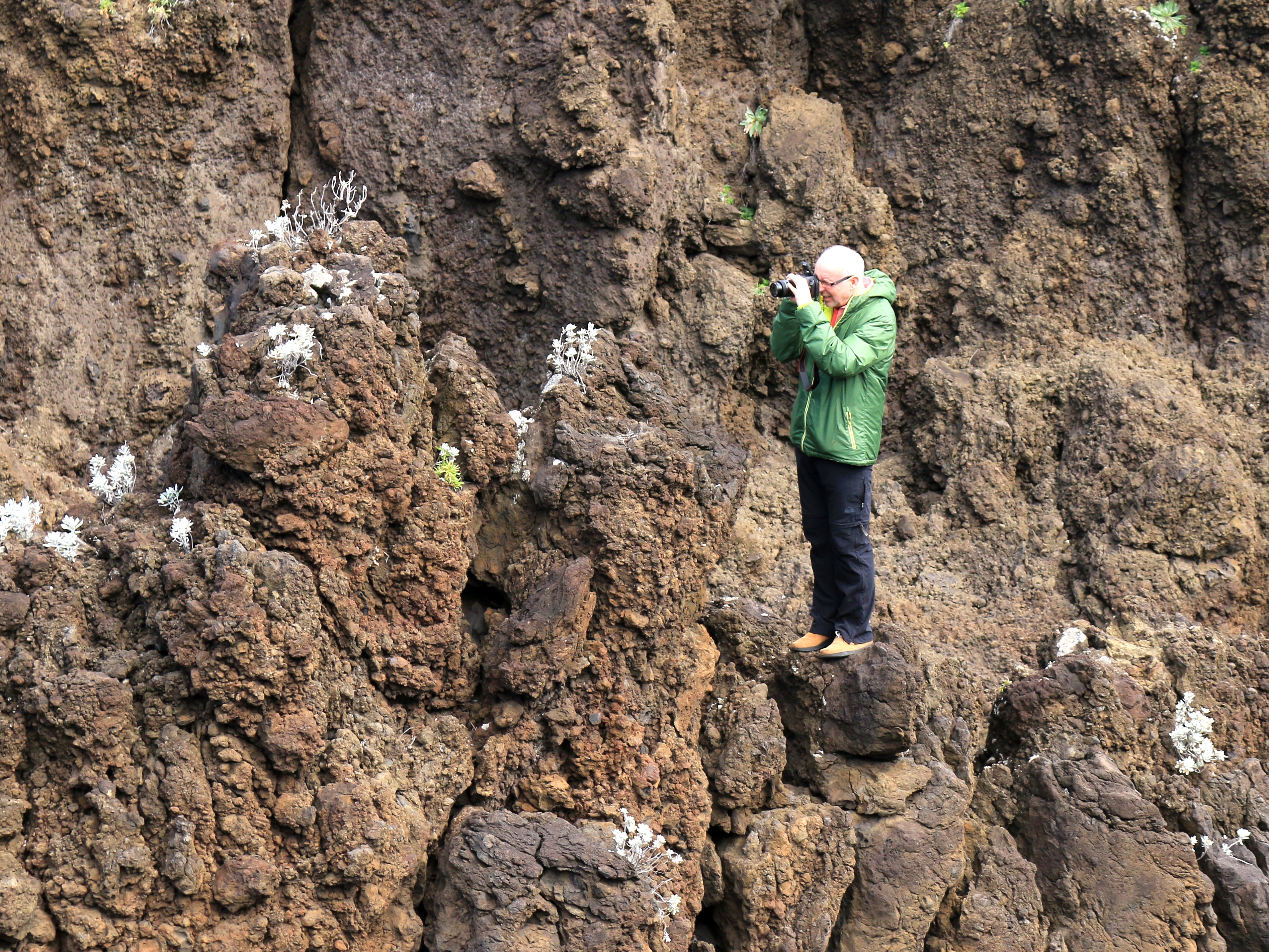 Amateur-Tierfotograf an einer Felswand in Porto Moniz, Madeira